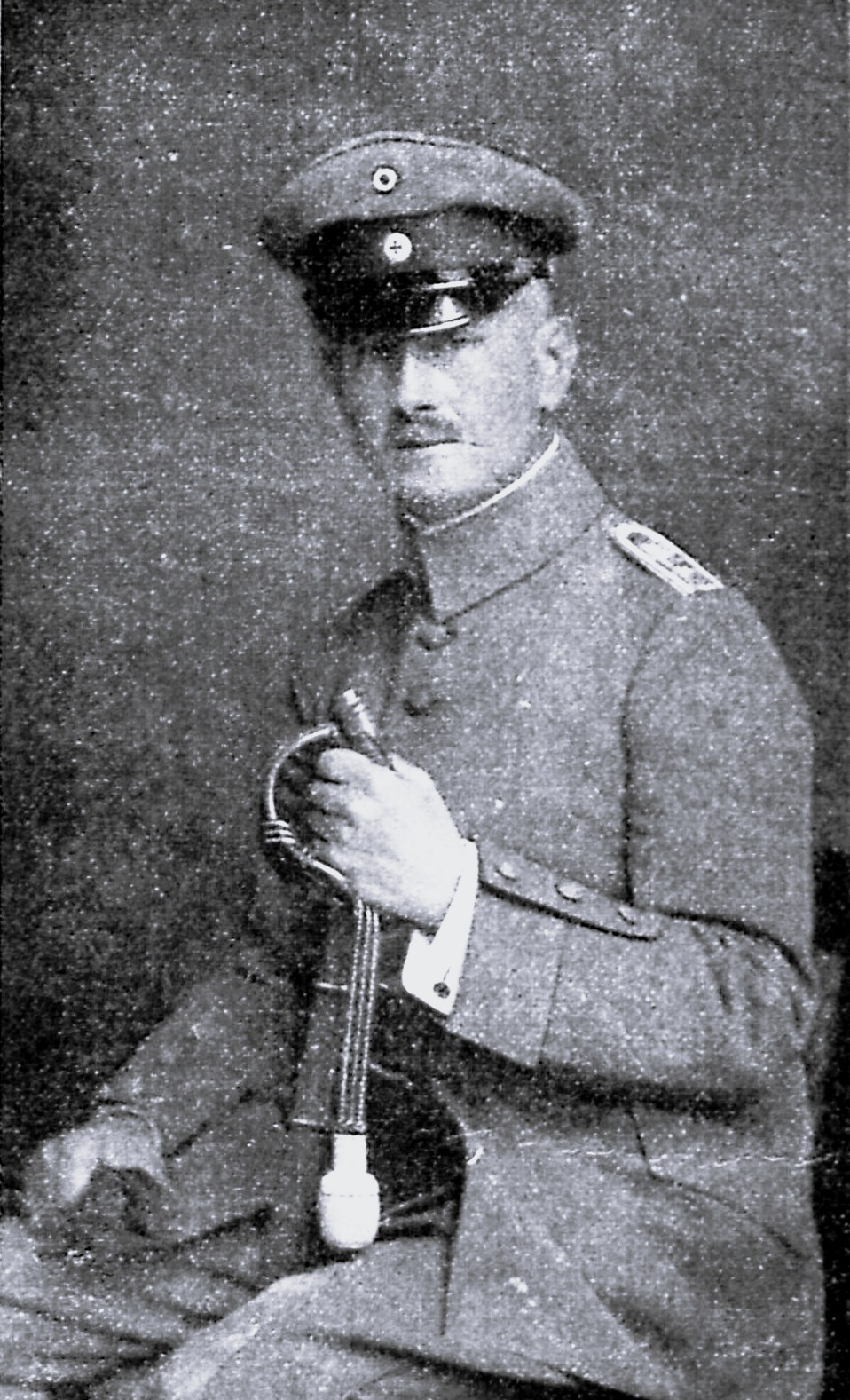 Lübeckischer Landgerichtsrat und Hauptmann der Landwehr.